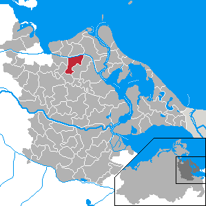 Neu Boltenhagen, Landkreis Ostvorpommern, Mecklenburg-Vorpommern